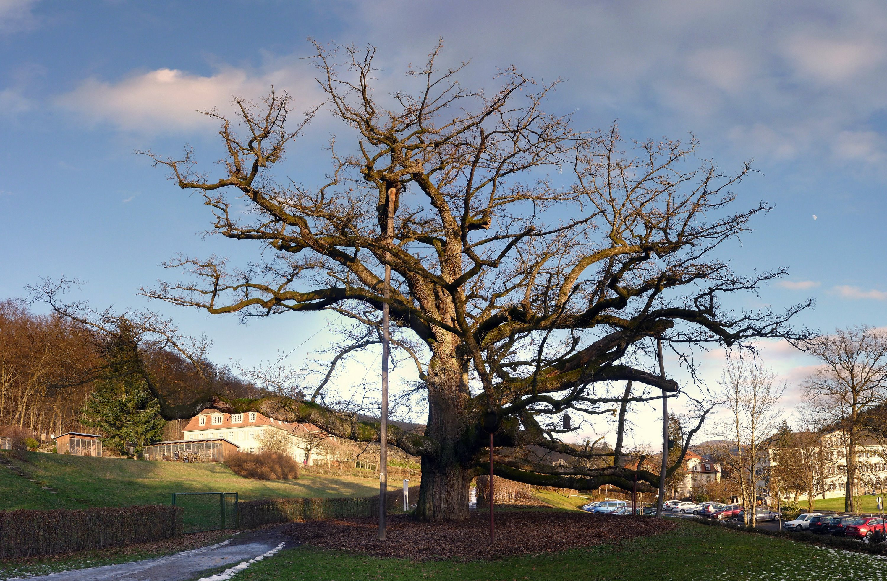 Königseiche